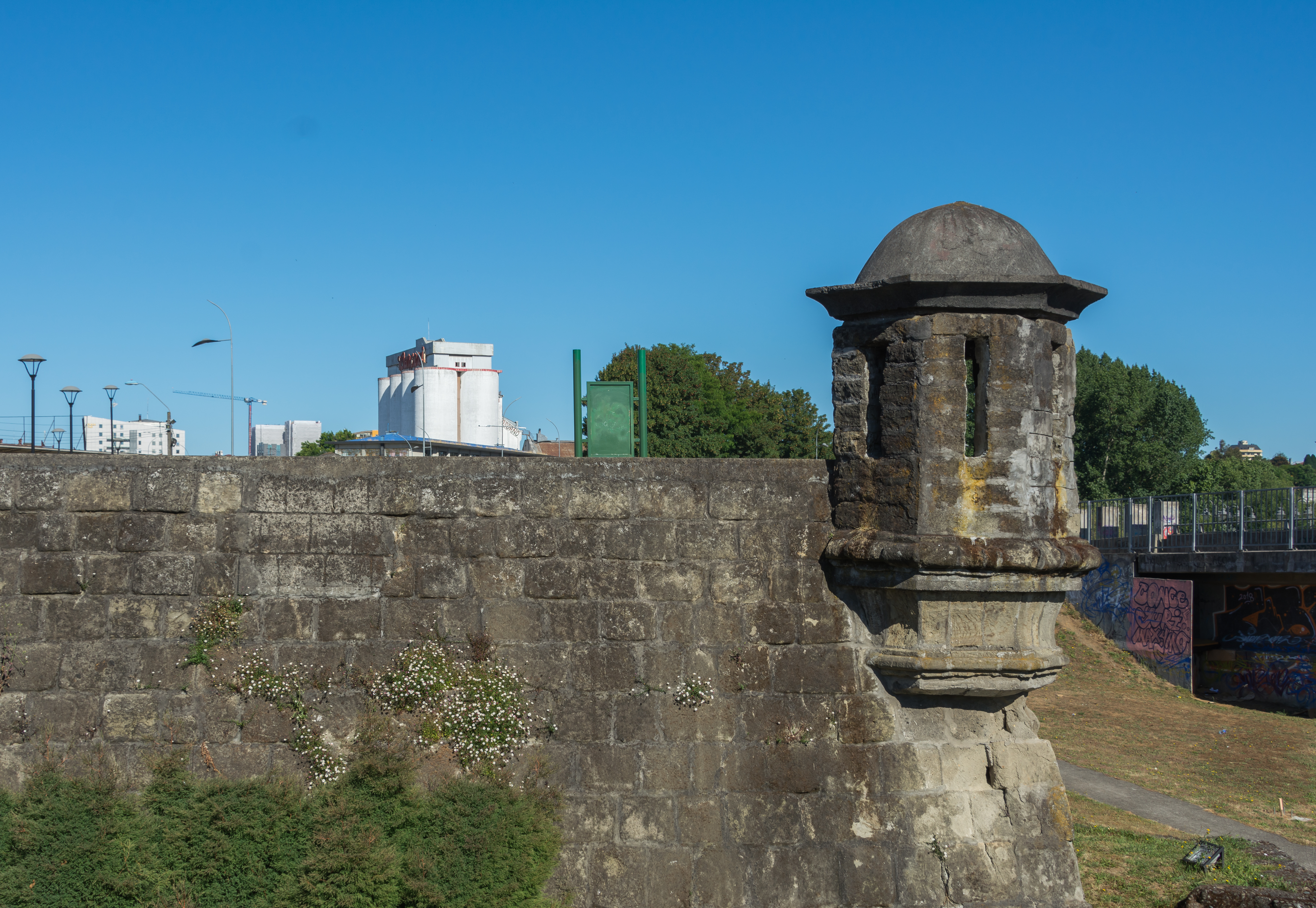 Fuerte Reina Luisa, Osorno, Región de Los Lagos, Chile.